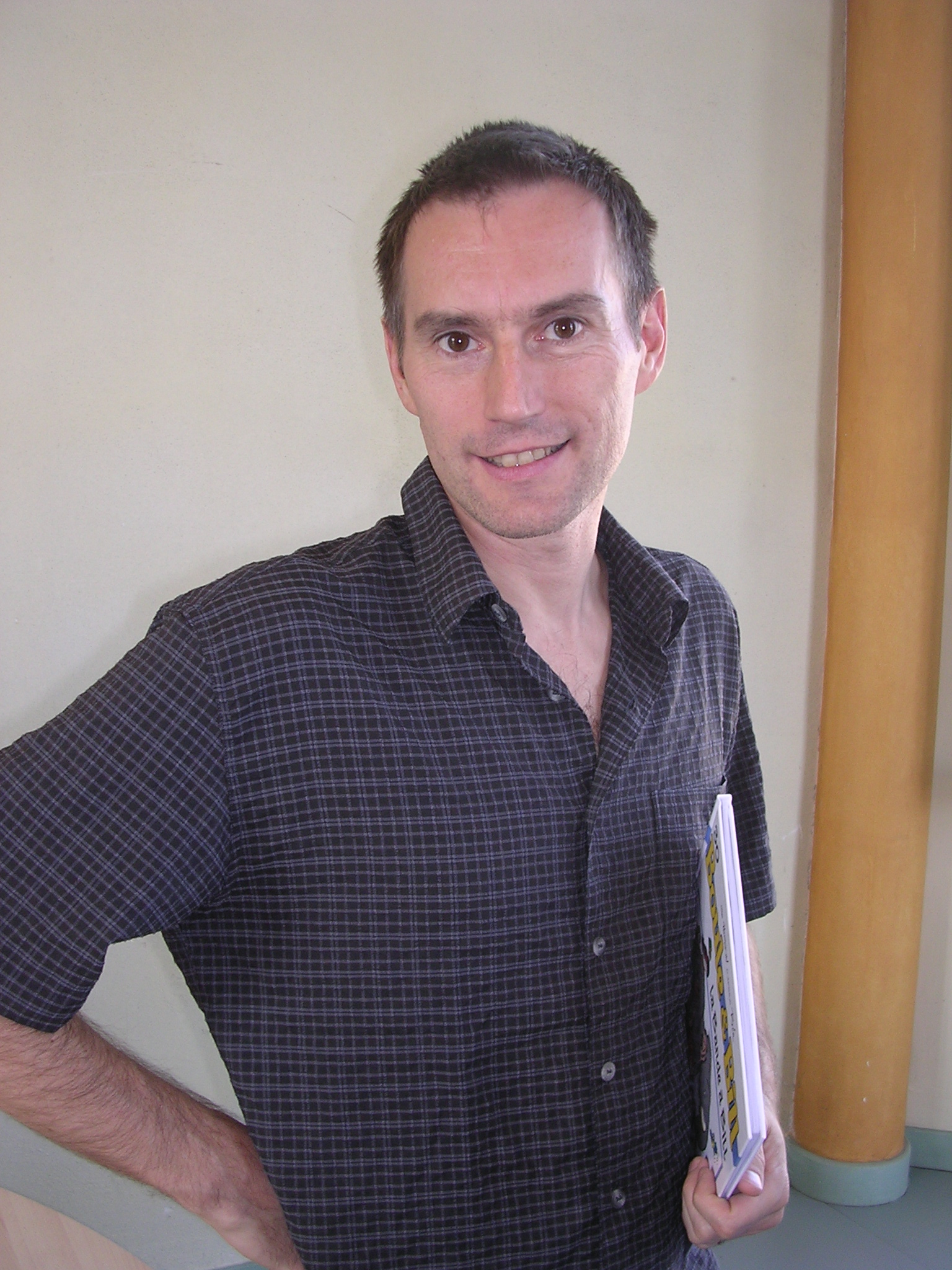 Laurent Verron, auteur de bandes dessinées, lors du festival de la BD de Chambéry (France), le dimanche 9 octobre 2005.